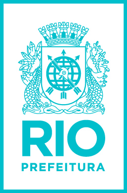 Logo oficial da Prefeitura do Rio de Janeiro